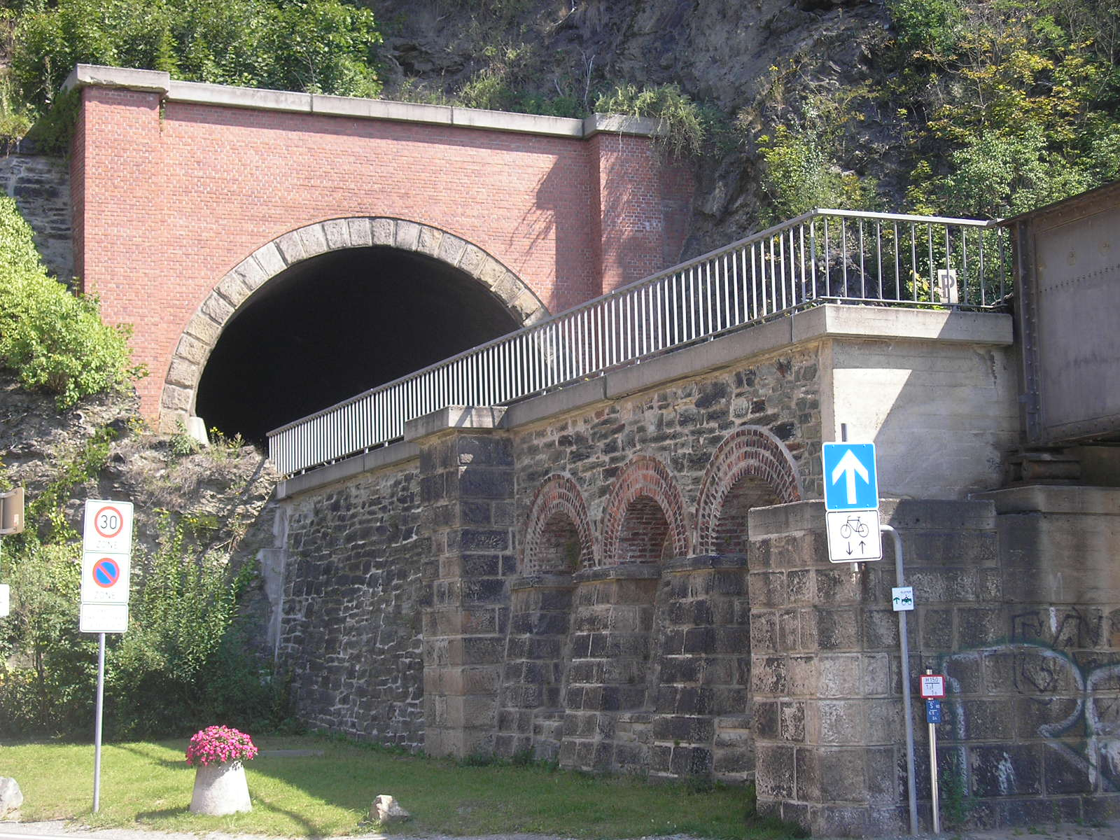 Das Südportal des Schlossbergtunnels in Greiz (Thüringen).